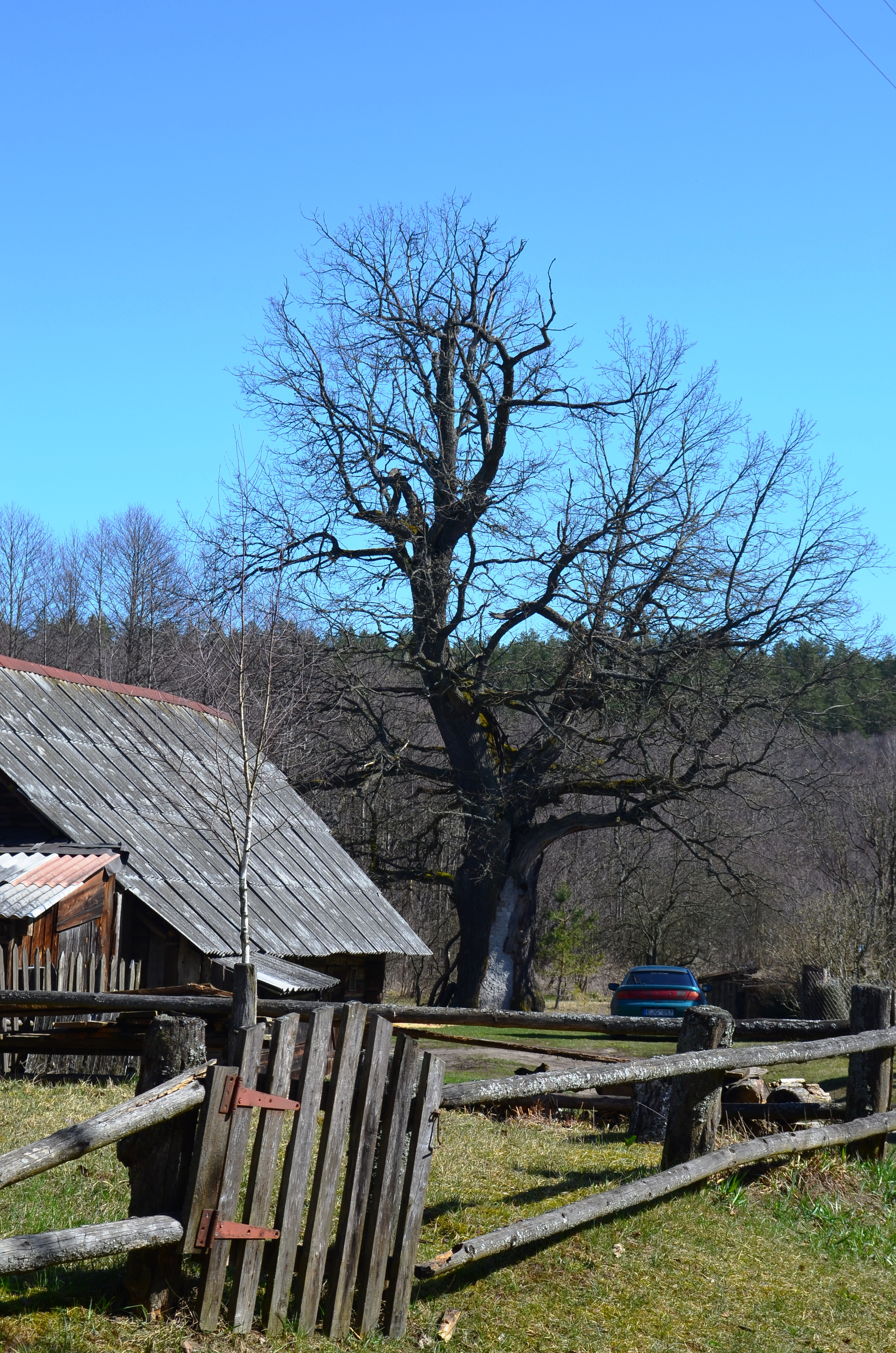 Zervynų ąžuolas pavasarį